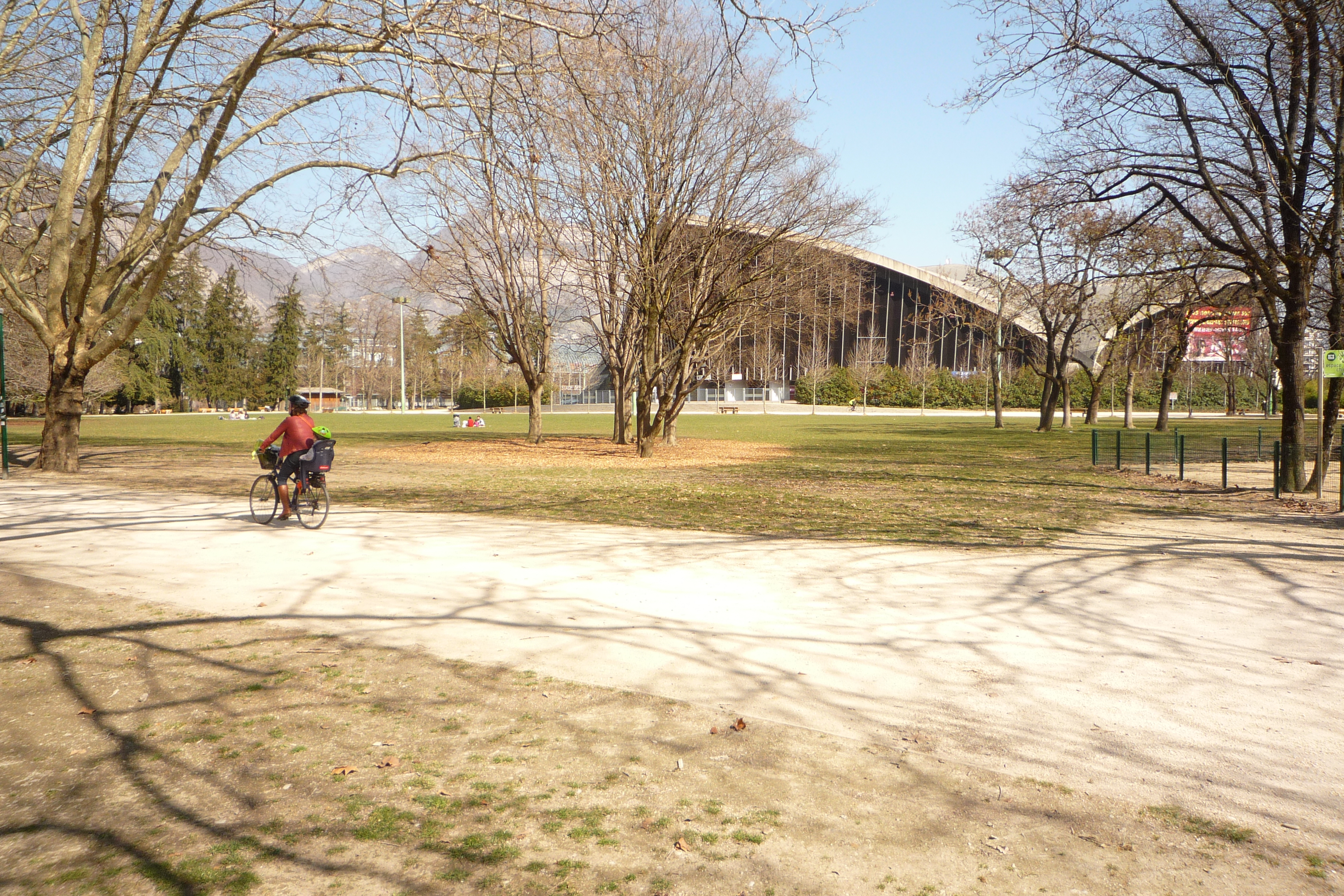 Allée du parc Paul-Mistral - Grenoblre